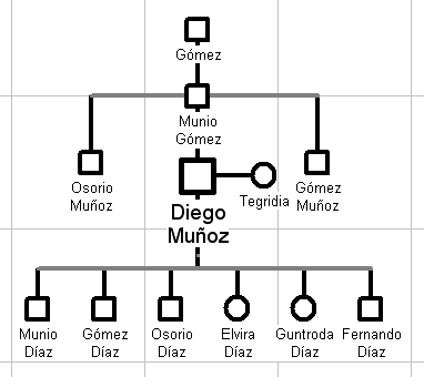 Origenes familiares y descendencia del conde Diego Muñoz de Saldaña. Referencias: *Martínez Díez, Gonzalo (1995). «La familia condal de Carrión», Actas del III Congreso de Historia de Palencia (vol. 2). *Montenegro Valentin, Julia (1985). «En torno a los orígenes familiares de Diego Muñoz, el Primer Conde de Saldaña», Actas del I Congreso de Historia de Palencia (vol. 2) *Torre Sevilla-Quiñones de León., Margarita Cecilia (1985). Linajes nobiliarios de León y Castilla: Siglos IX-XIII.